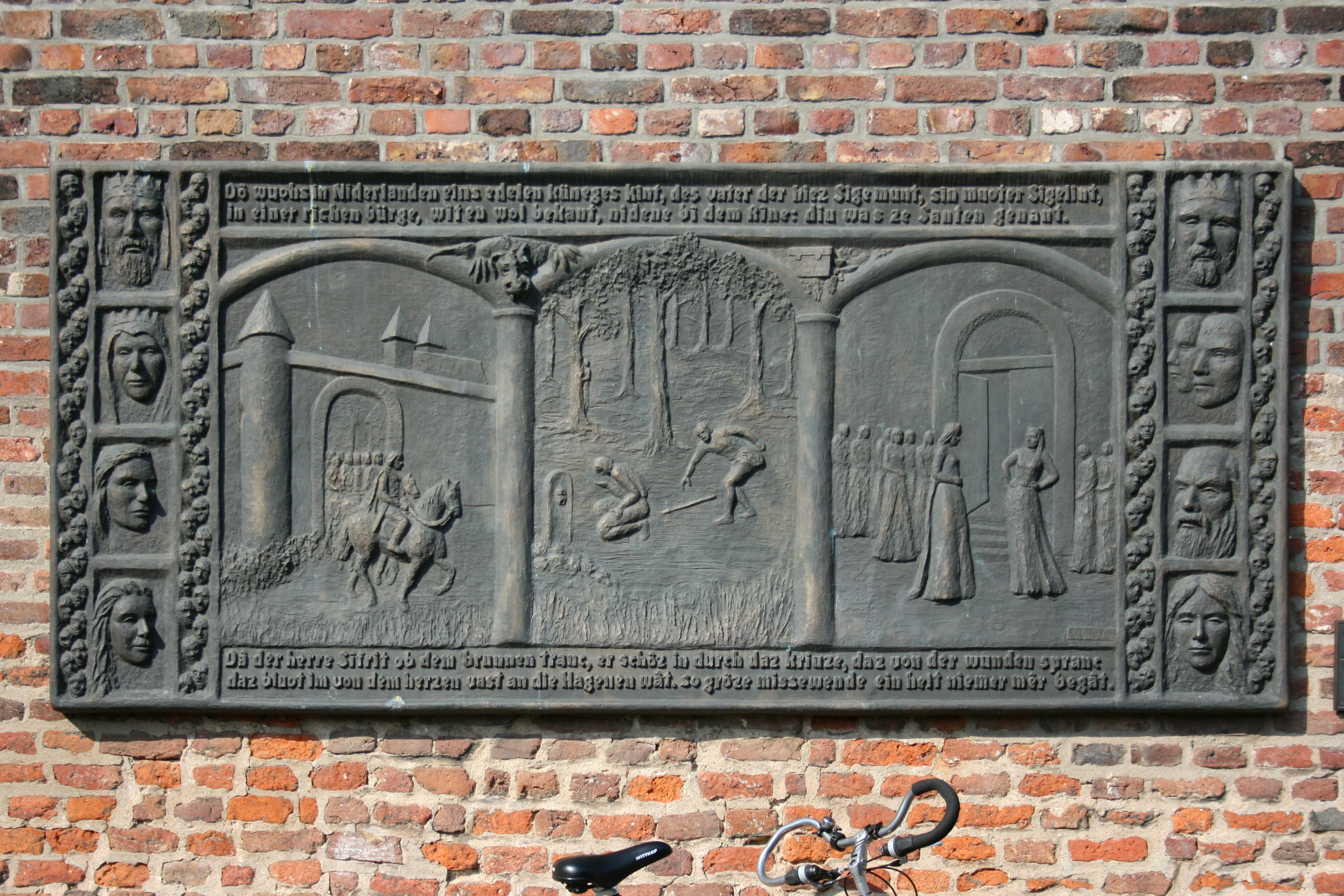 Siegfried in Xanten, Relief von Erika Rutert am Nordwall in Xanten (neben der Kriemhildmühle)